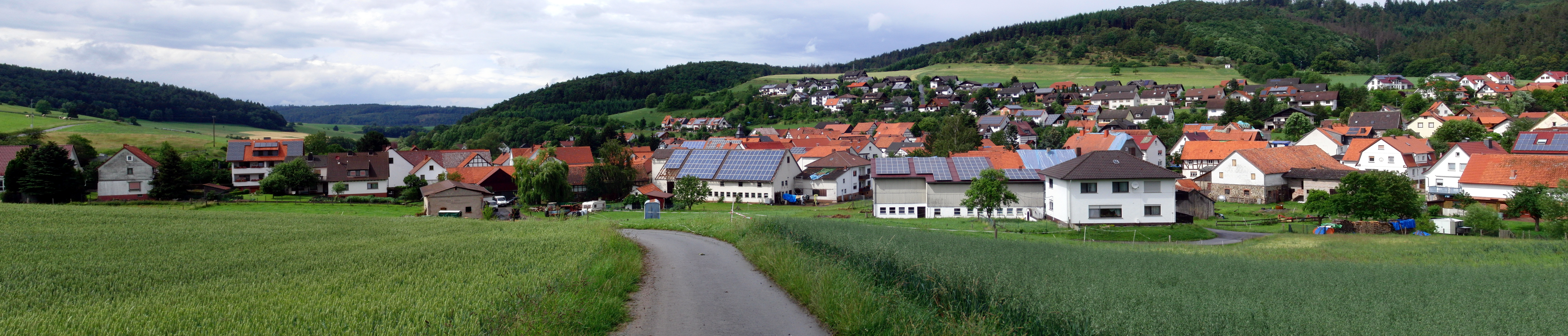 Panorama von Altenlotheim (Waldeck-Frankenberg, Hessen) Hinweis: erstellt mit der Freeware Hugin 2010